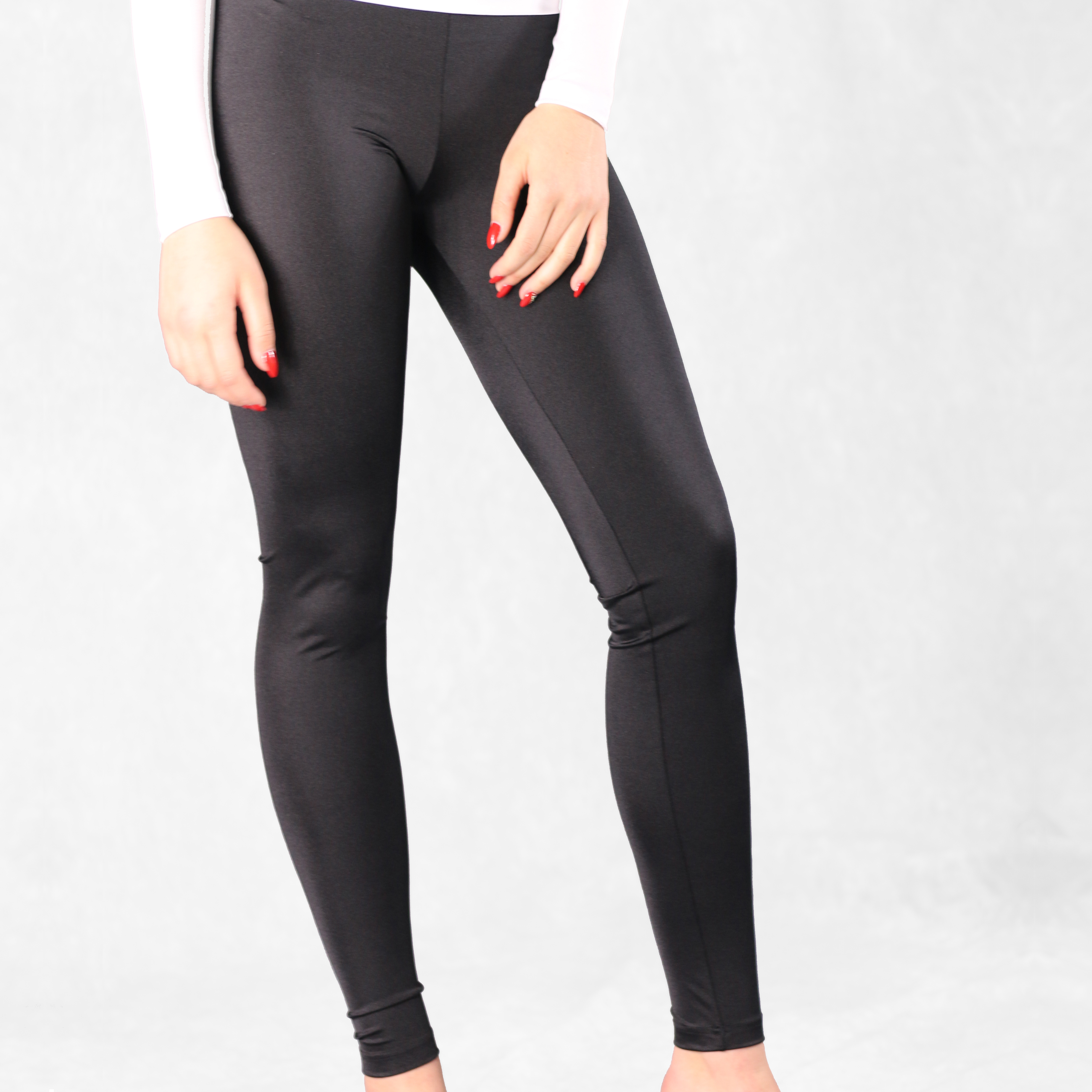 Svetleče pajkice iz poliamid-a za ples